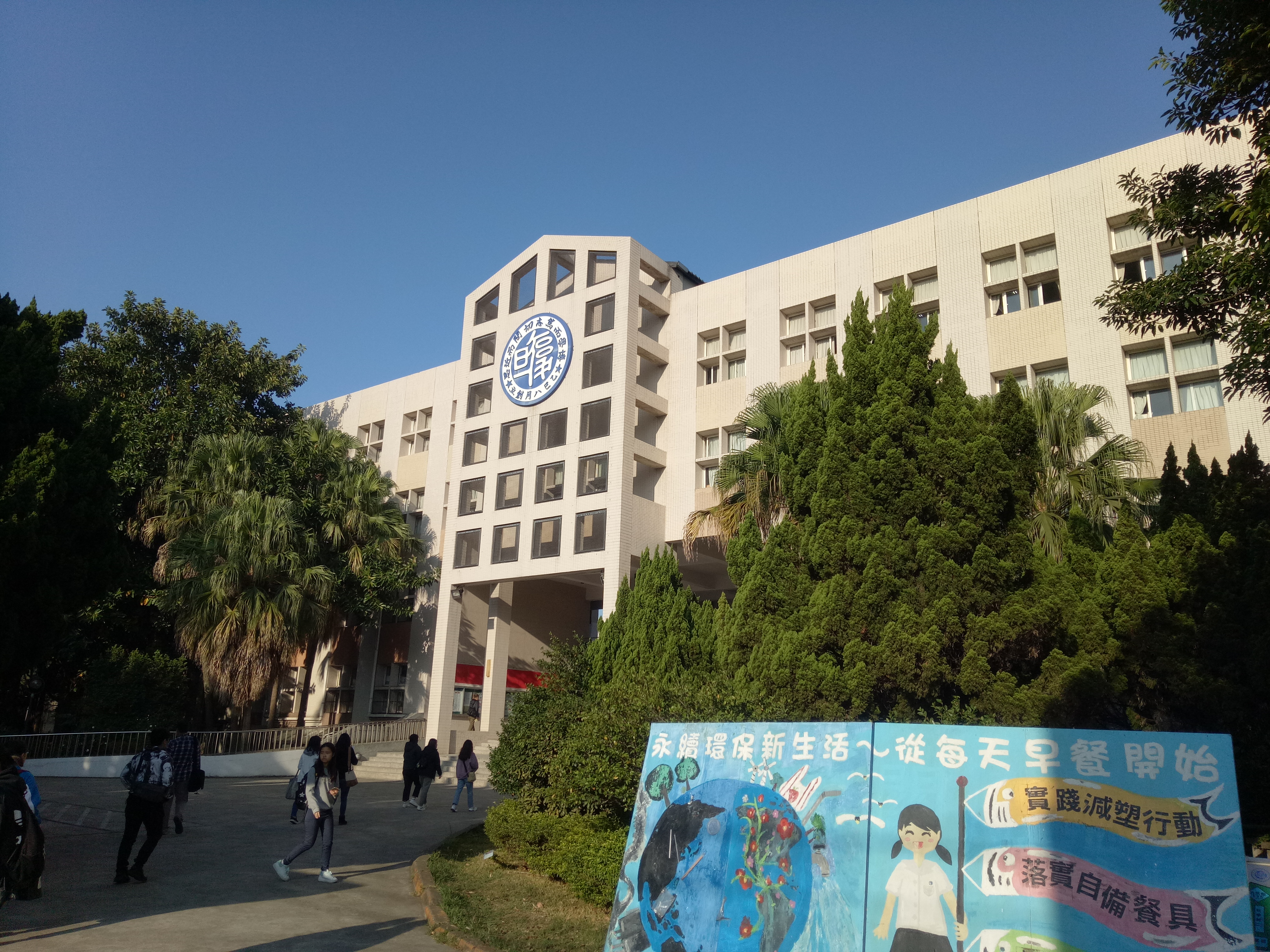 桃園市復旦高級中學 （2019年）